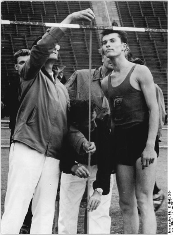 Leipzig, Turn- und Sporttreffen, Hochsprung Zentralbild Leipzig Son-Qu 19.7.1957 Dittrich Turn- und Sporttreffen der Jugend in Leipzig. Anlässlich des Turn- und Sporttreffens der Jugend in Leipzig wurden am 19.7.1957 die Meisterschaften der Jugend in der Leichtathletik weitergeführt. In verschiedenen Disziplinen wurden bereits die Jugendmeister ermittelt. UBz: Der neue deutsche Meister im Hochsprung, Dietmar Schröder, überzeugt sich mit dem Kollegen vom Kampfgericht von seiner Sprunghöhe.